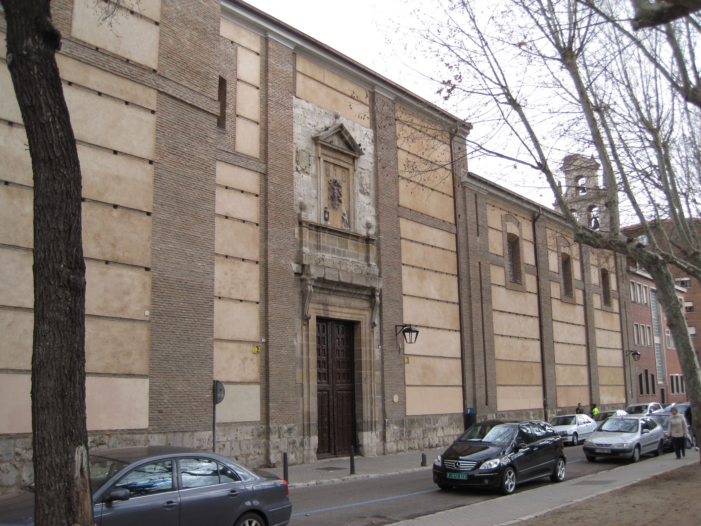 Iglesia Conventual de San Quirce y Santa Julita. Valladolid (España).